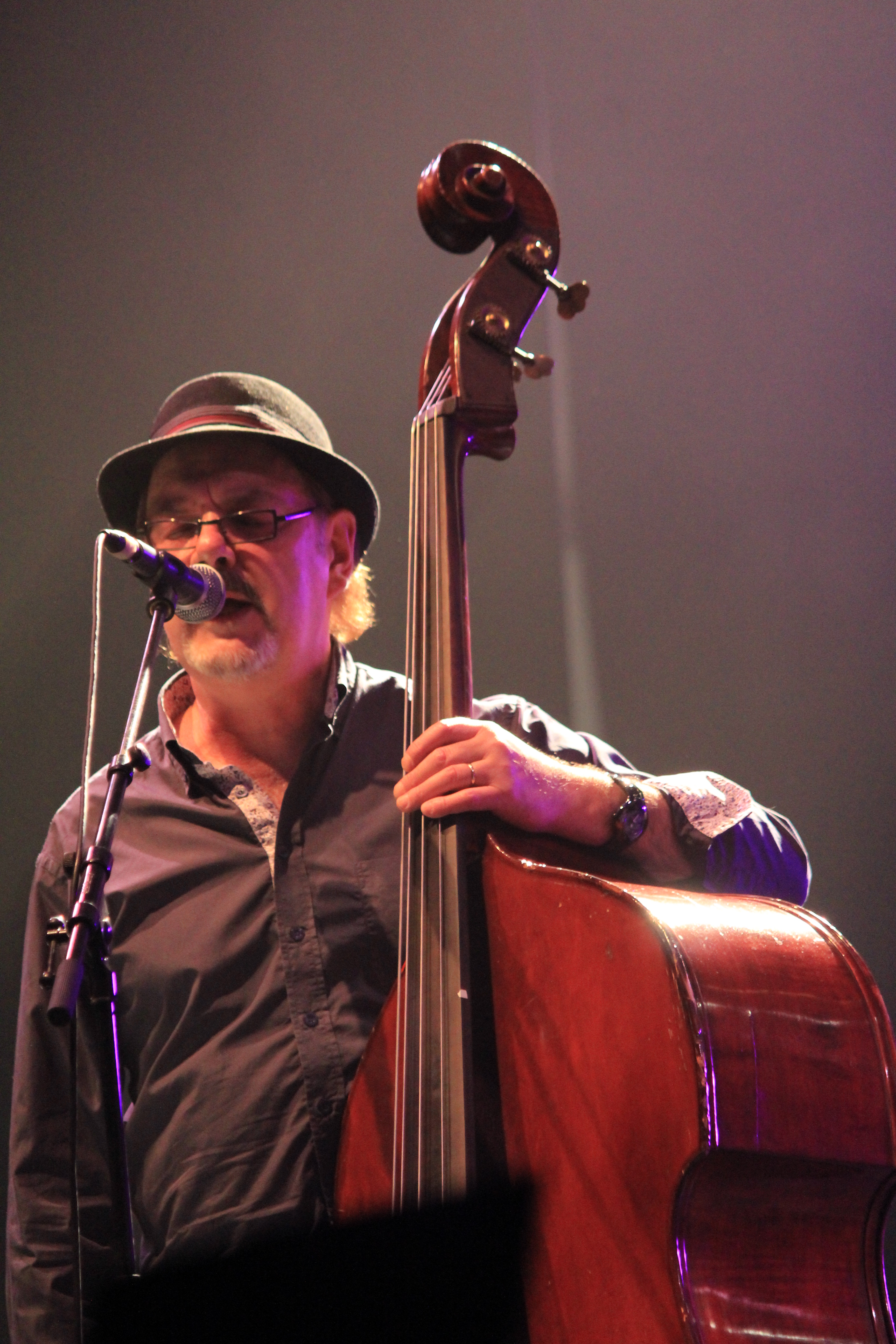 Pádraig Ó Dúgáin pendant le concert de Clannad lors du festival interceltique de Lorient 2013